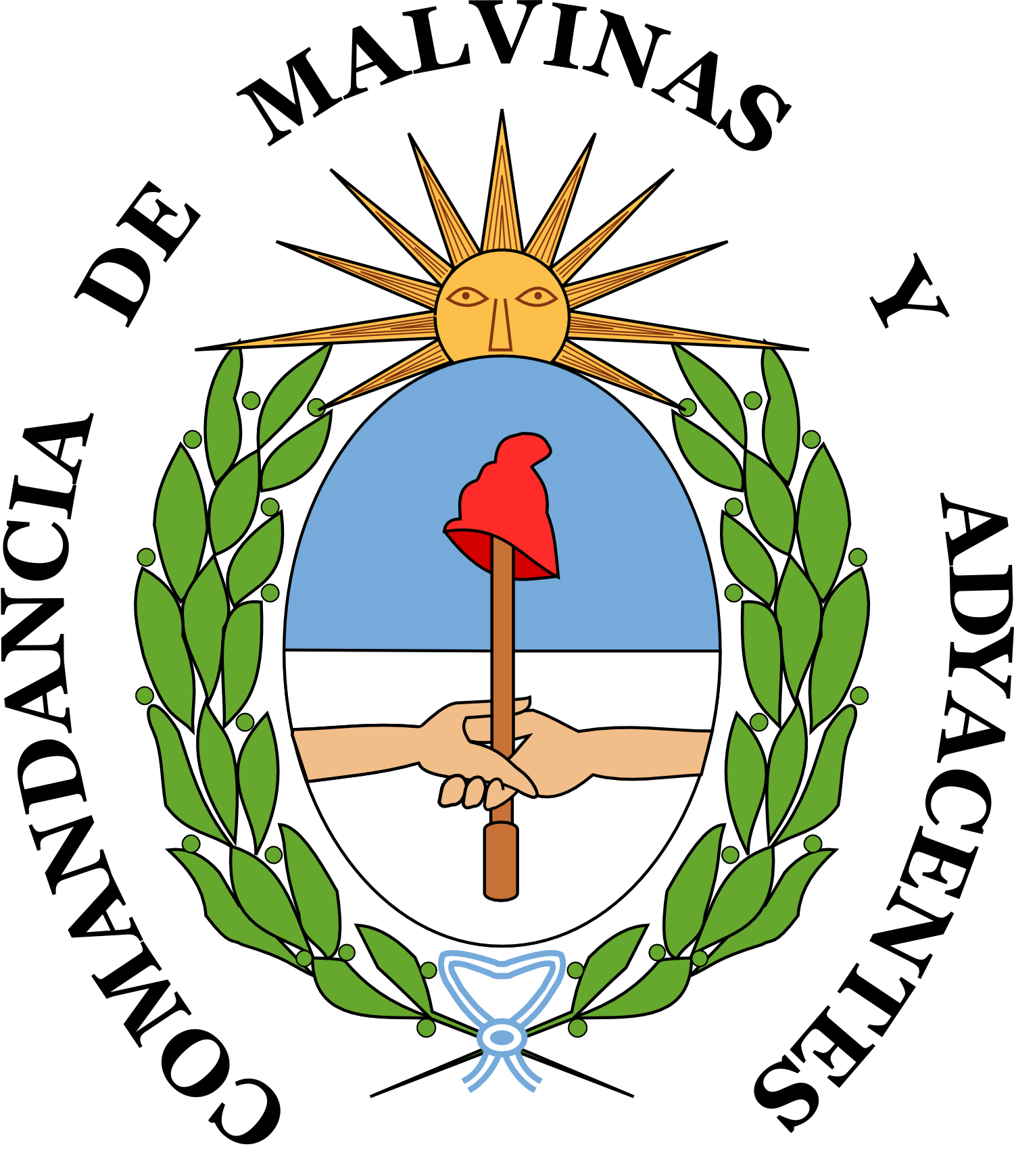 Se trata de una variante del escudo nacional argentino, manteniendo los mismos elementos pero con terminaciones distintas en el sol, los laureles y el gorro frigio. A eso se le agrega el nombre de la Comandancia. La imagen fue creada sobre la base de esta medalla